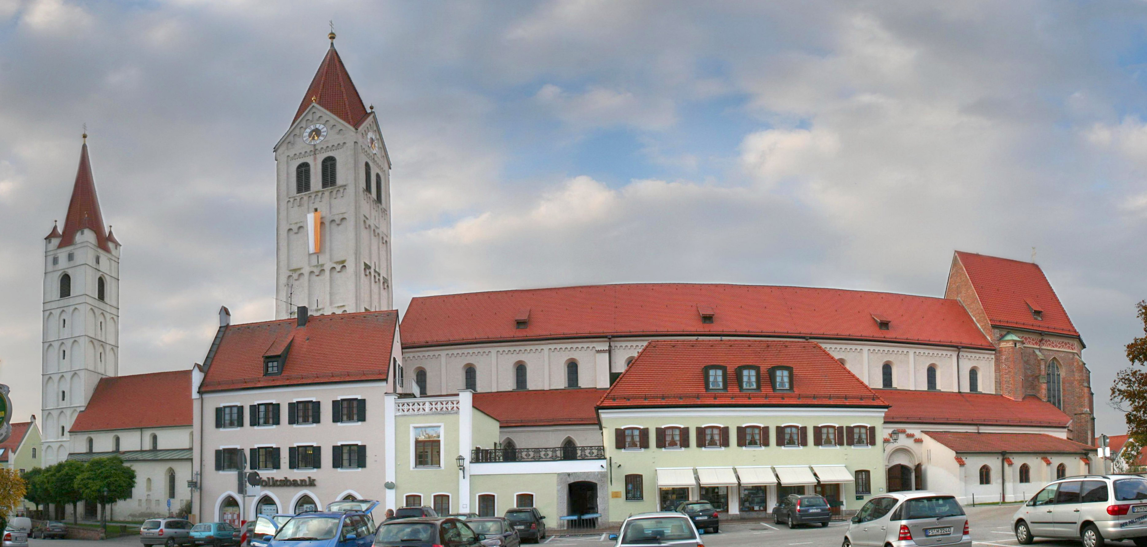 Moosburg Kastulusmünster südseite